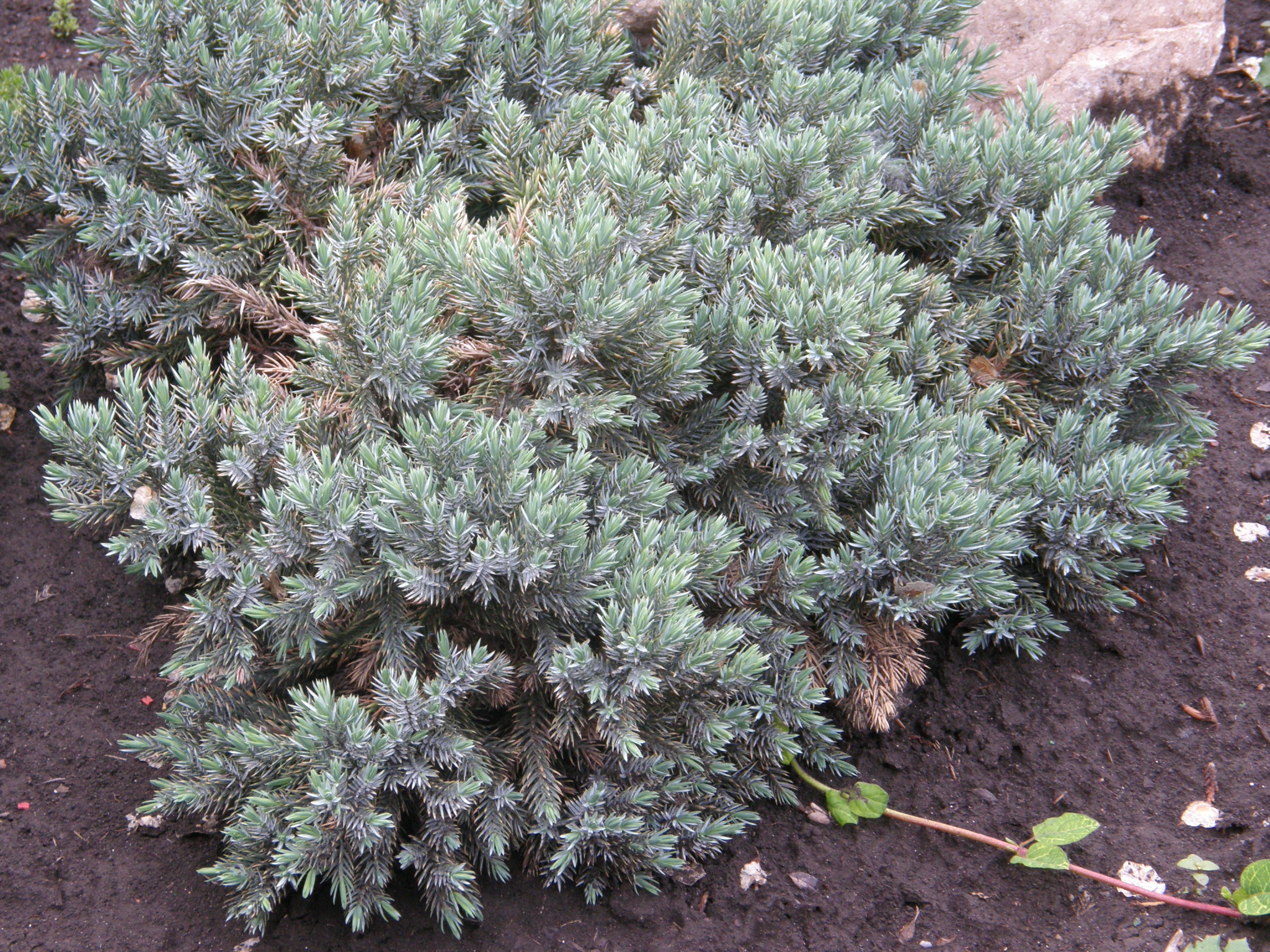 Парк Донецкого металлургического завода